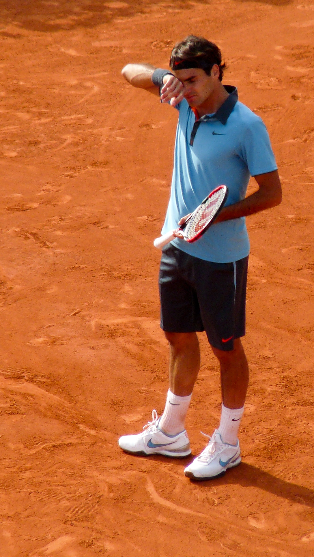 Roger Federer against Juan Martín del Potro in the 2009 French Open semifinals